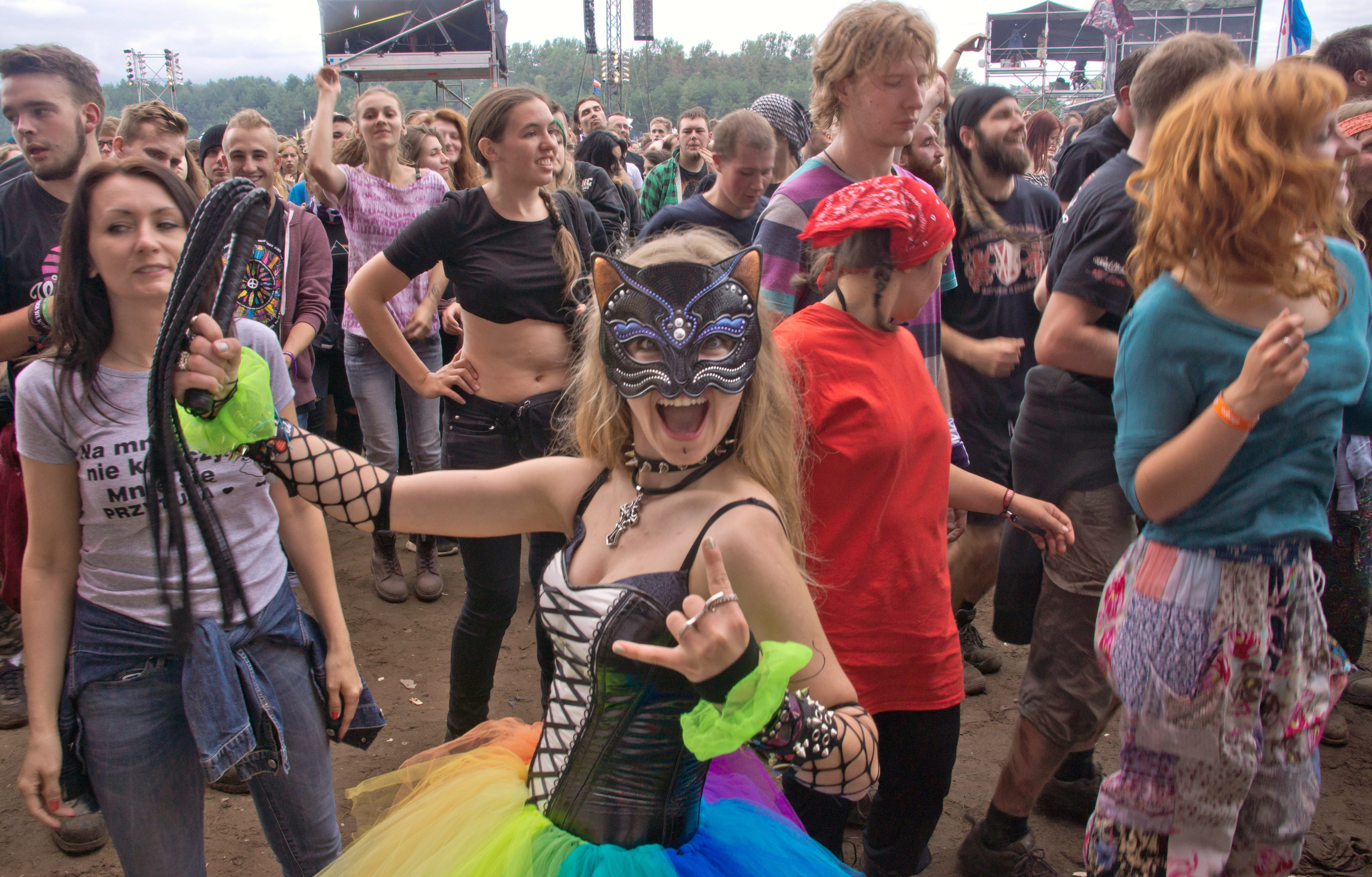 Przystanek Woodstock 2016 - przed sceną